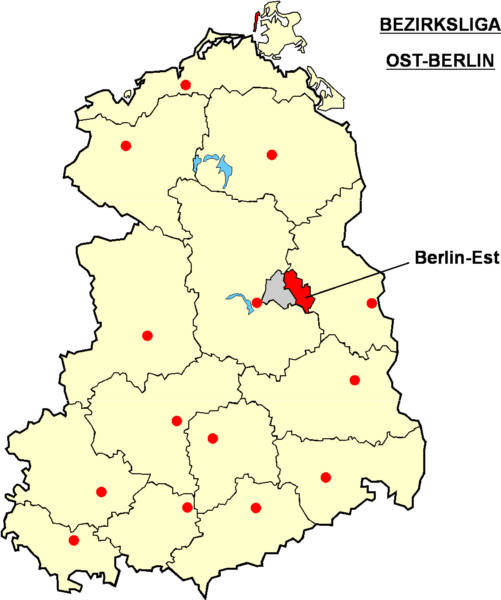 Localisation de la "Bezirksliga Ost-Berlin" dans le territoire de l'ancienne République démocratique allemande (RDA) Catégorie:Football en Allemagne